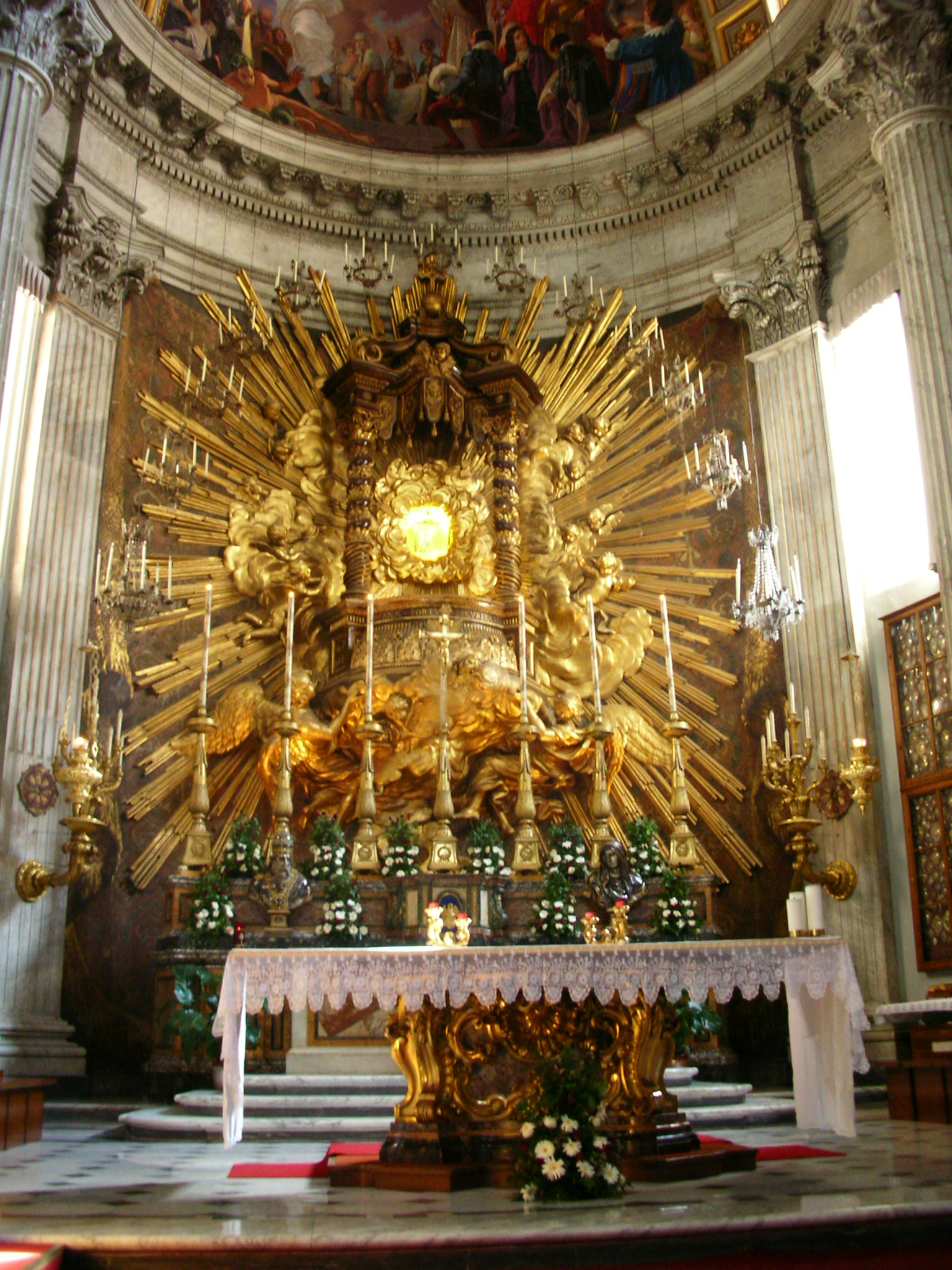 Main Altar, Santa Maria in Portico, Rome